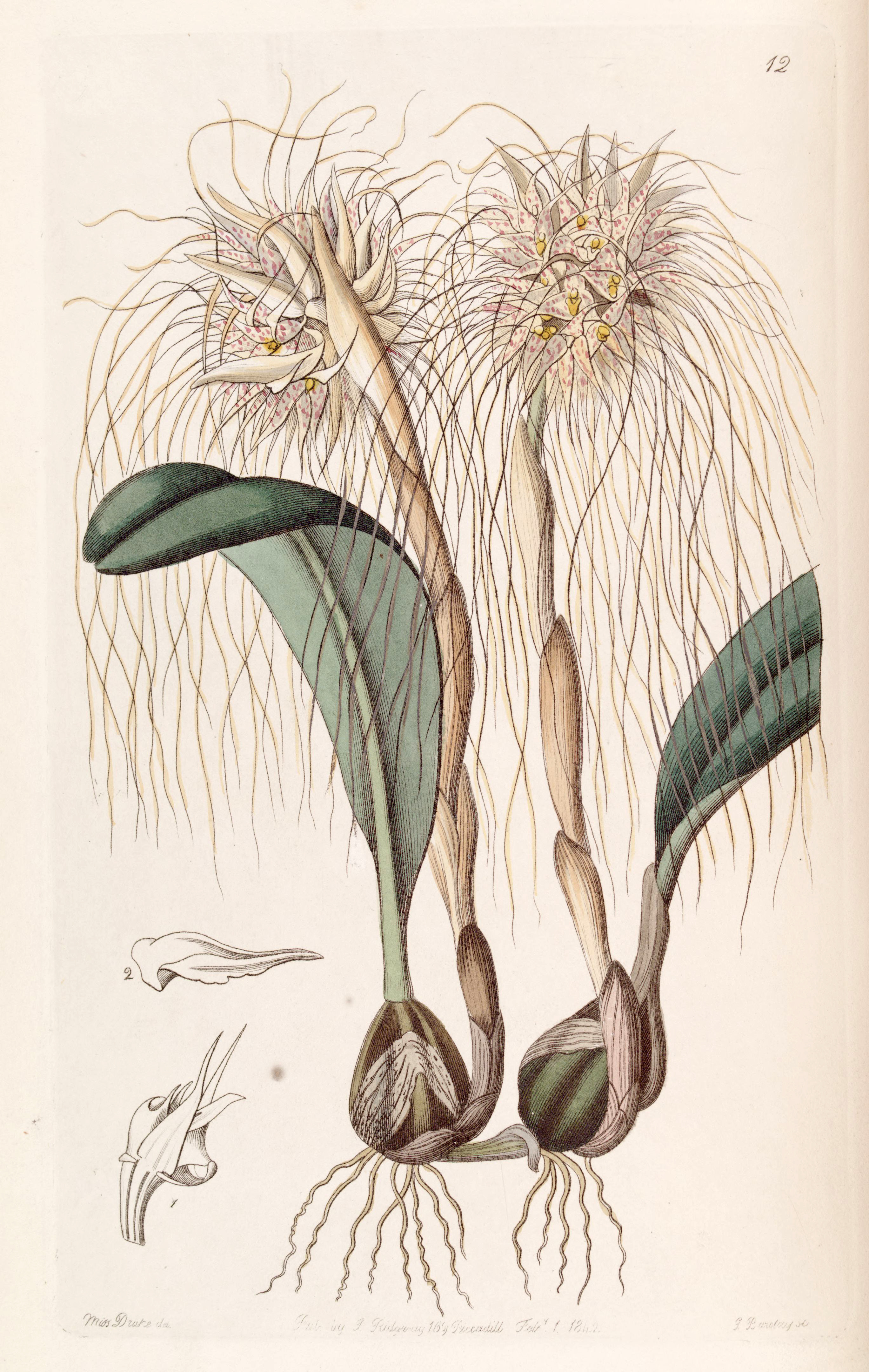 Bulbophyllum medusae (as syn. Cirrhopetalum medusae)